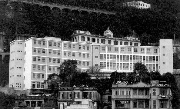 嘉諾撒聖方濟各書院在1950年代的校舍